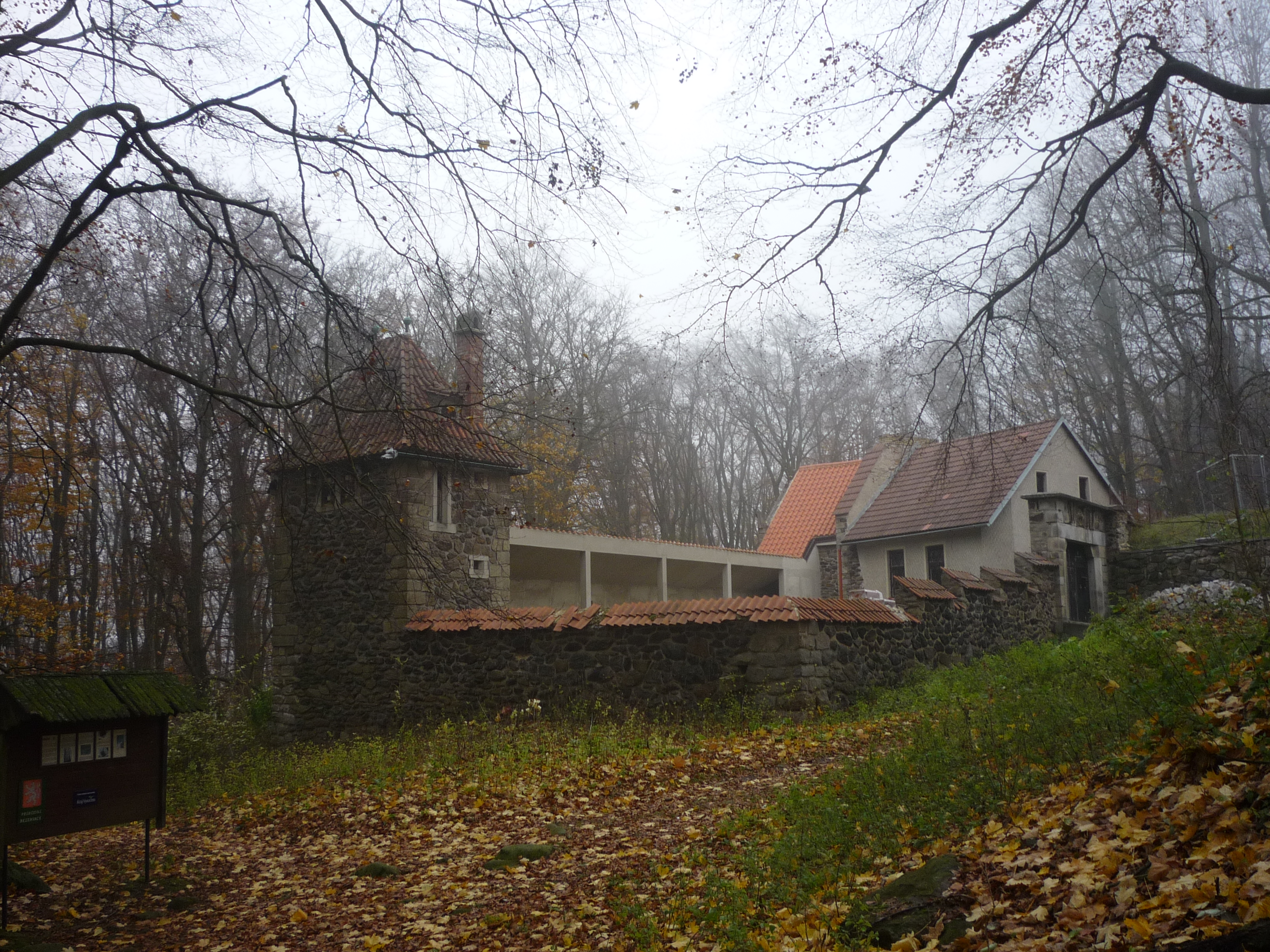 Autor fotografie Jiří Zelenka.Větrný zámek (Křemešník). Romantickou letní vilu zvanou pod jménem Větrný zámek si významný sochař Josef Šejnost nechal vyprojektovat a posléze postavit v letech 1930-34 od renomovaného architekta a stavitele Kamila Hilberta, který se podílel i na dostavbě katedrály sv. Víta v Praze.Křemešník. Nový Rychnov. Okres Pelhřimov. Kraj Vysočina. Czech Republic.